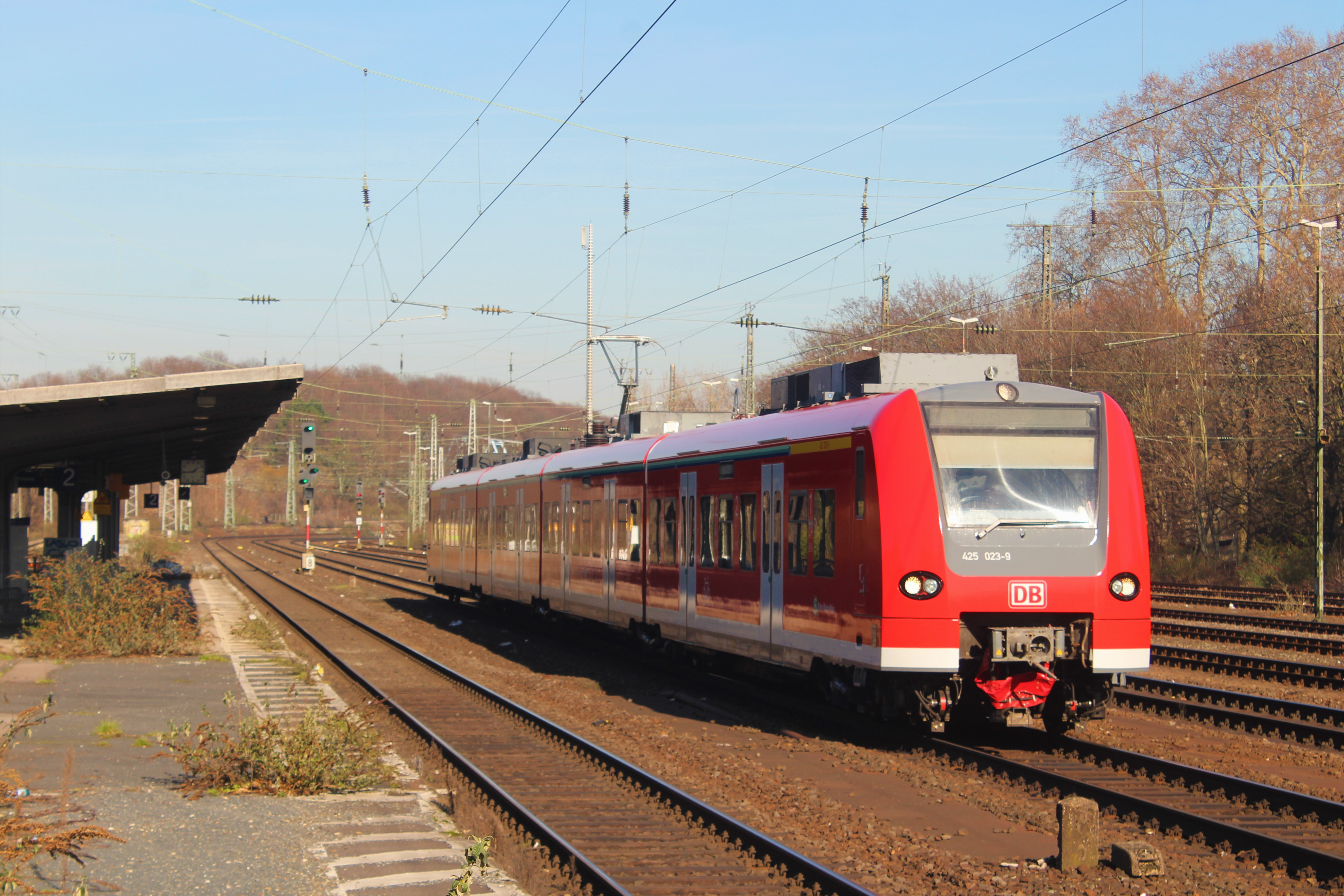 25 023 der S-Bahn Rhein-Main in Köln West Mitte Februar 2019 auf dem Heimweg Richtung Frankfurt.